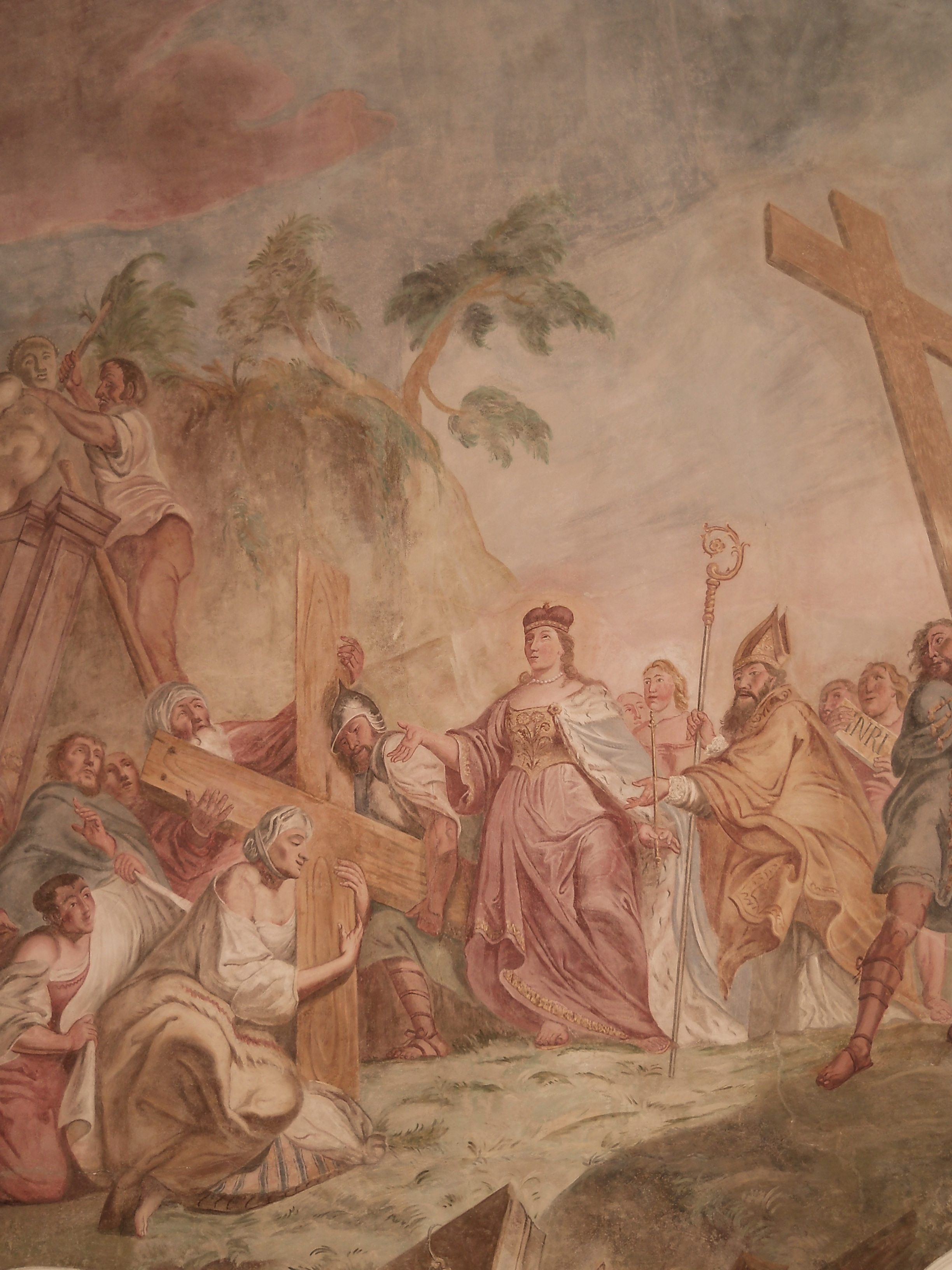 Wallfahrtskirche Hl. Kreuz im Schambachtal bei Arnsberg, Landkreis Eichstätt, Deckenfresko, die Kreuzauffindung durch die Kaiserin Helena zeigend